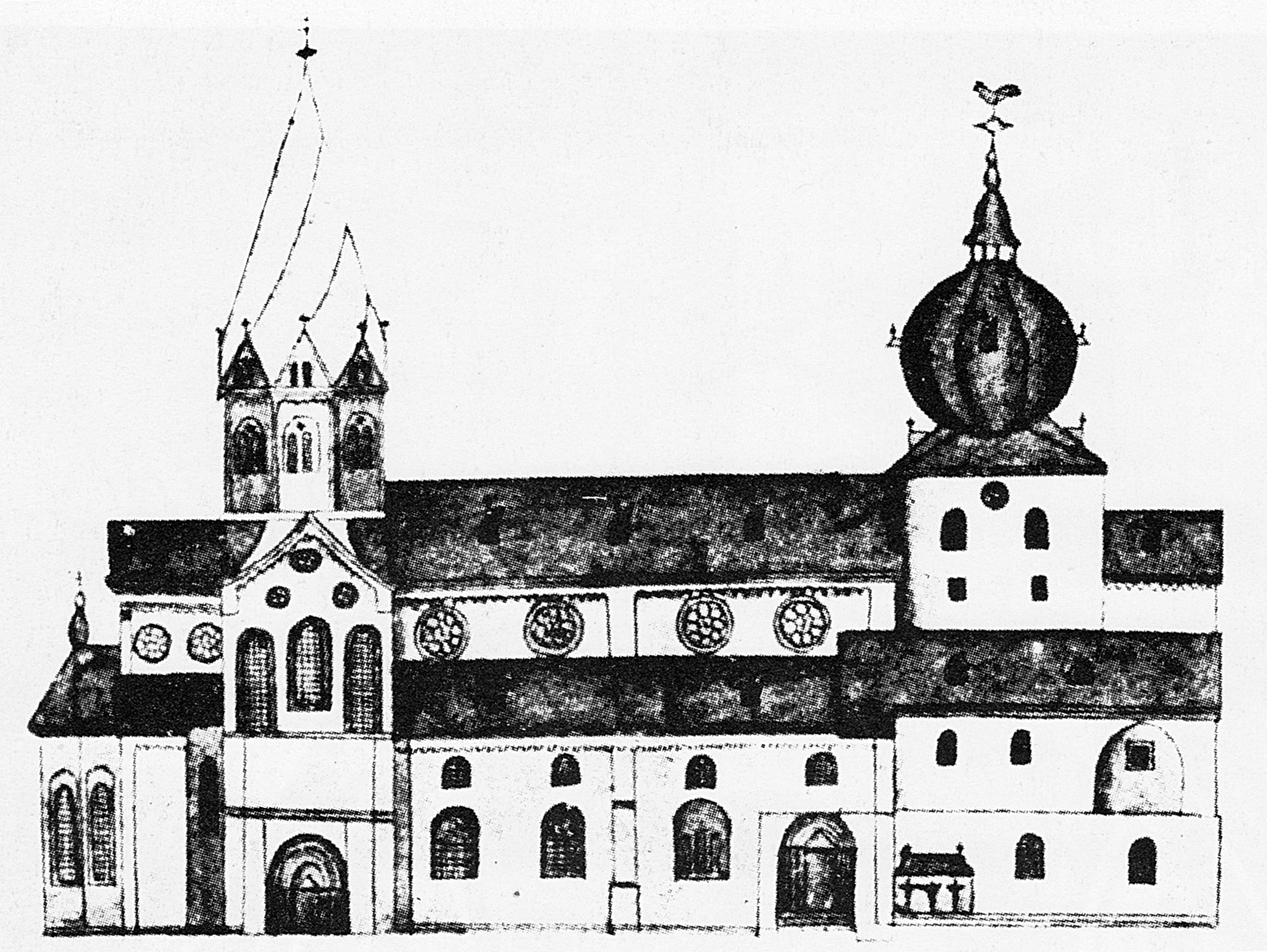 Ansicht der Abteikirche Werden im Bauzustand von 1800